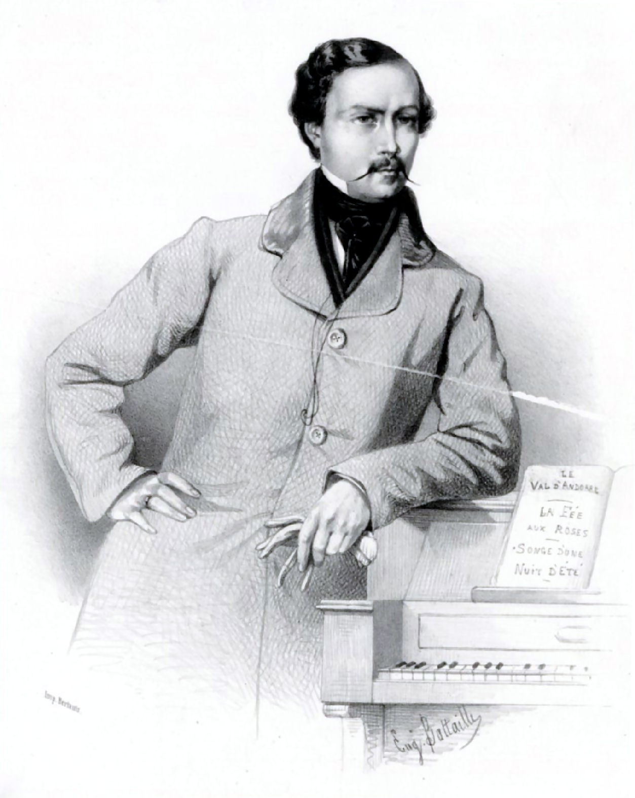 Portrait de Charles-Amable Battaille (lithographie d'Eugène Battaille)